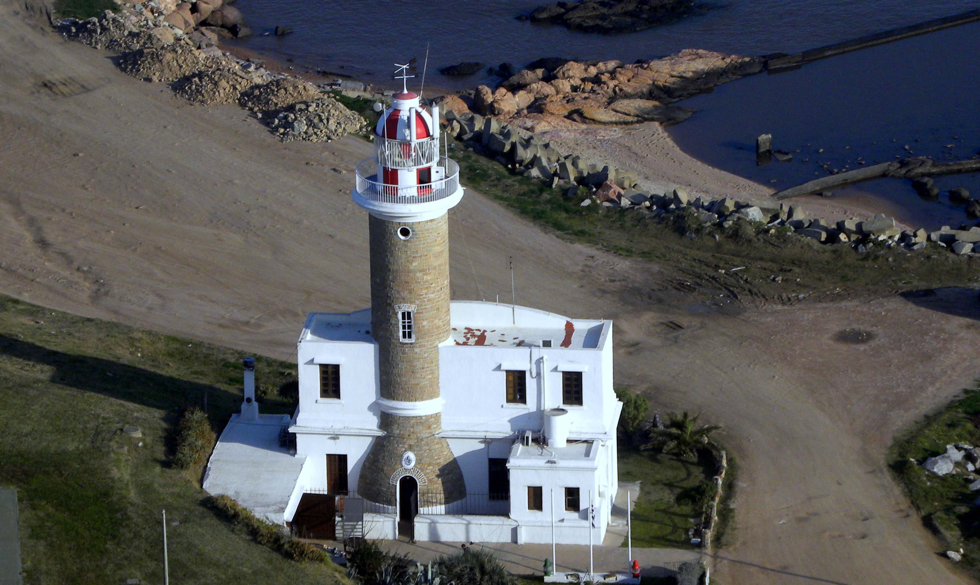 Faro de Punta Brava. Ubicada en el departamento de Montevideo